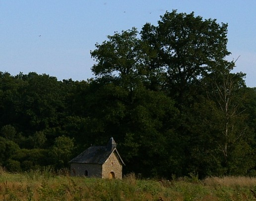 chapelle sainte-Anne d'Hermet